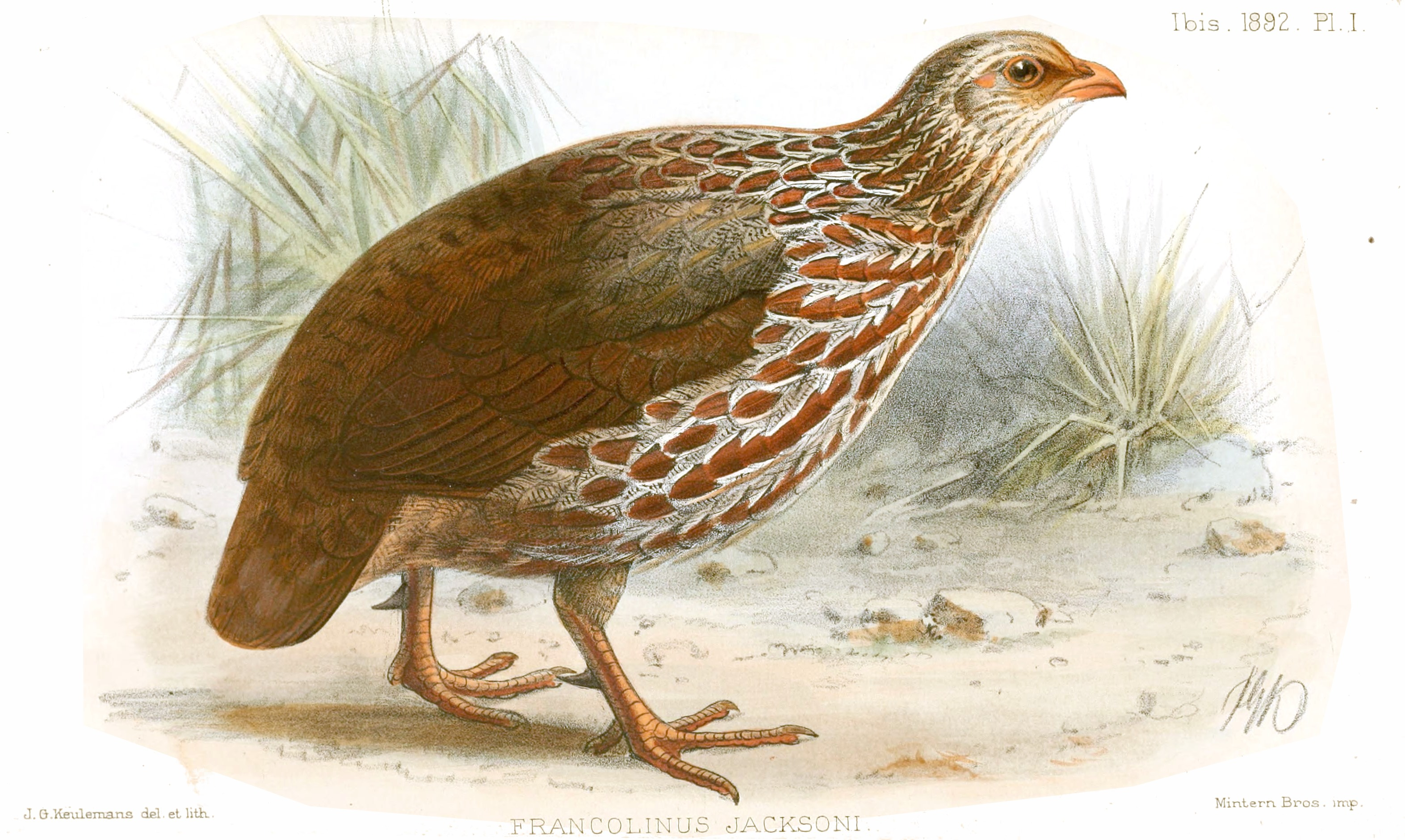 Francolinus jacksoni